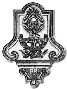 El escudo del municipio de Villanueva surge de la ilustración en cantera que se ubica en el centro de la ciudad, siendo su autor desconocido.